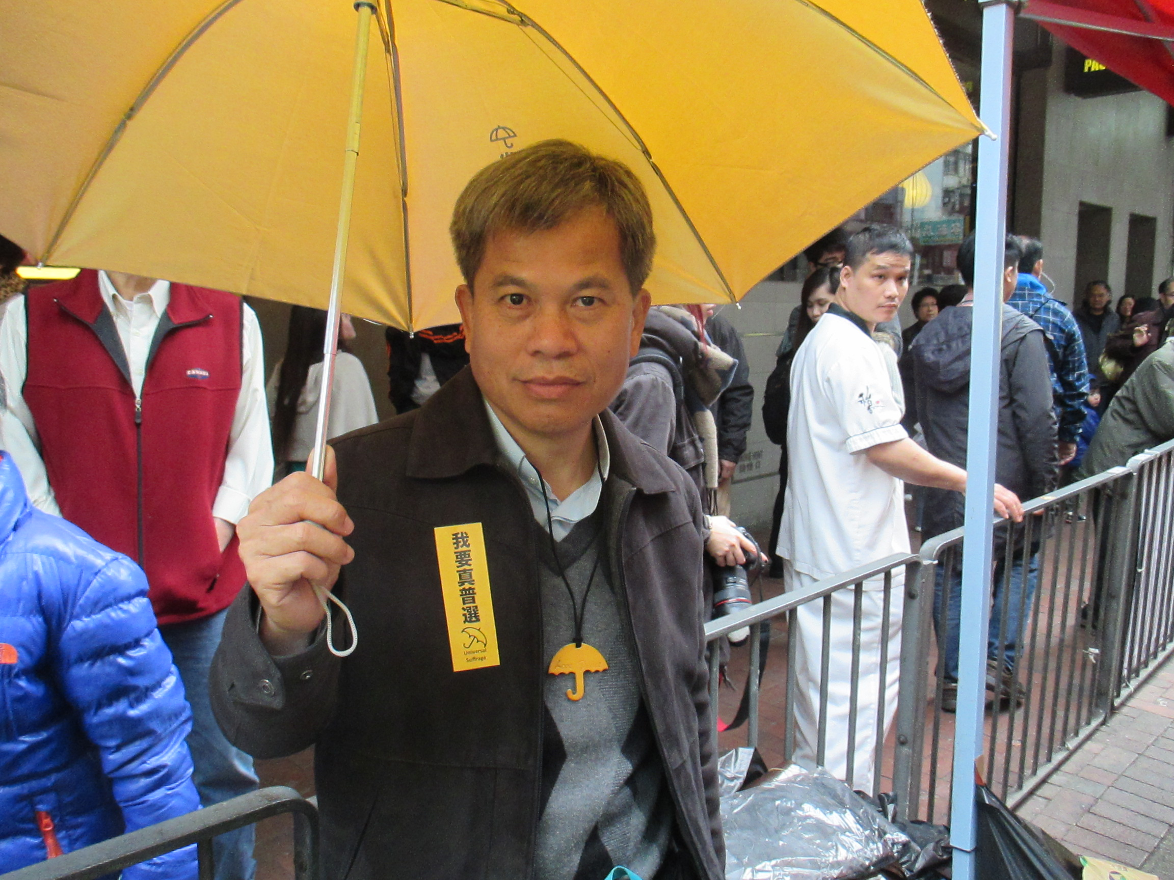 馮智活牧師，2015年2月1日遊行。